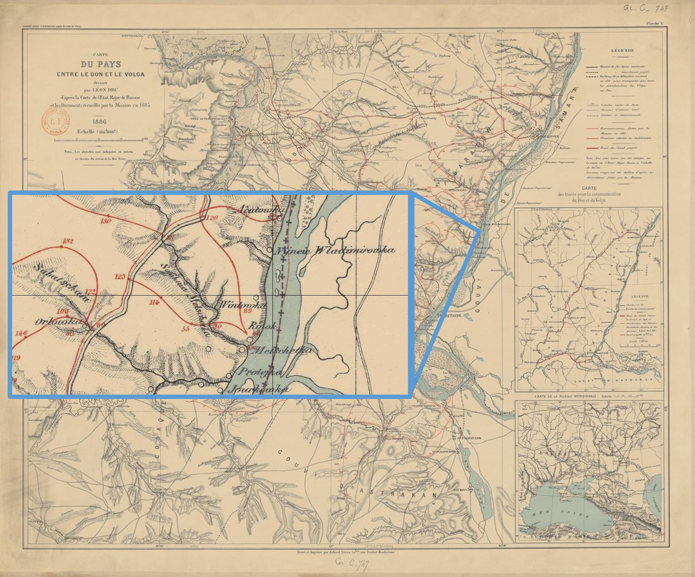 Карта междуречья Дона и Волги с выделением Части Волги от Рынка до Акатовки